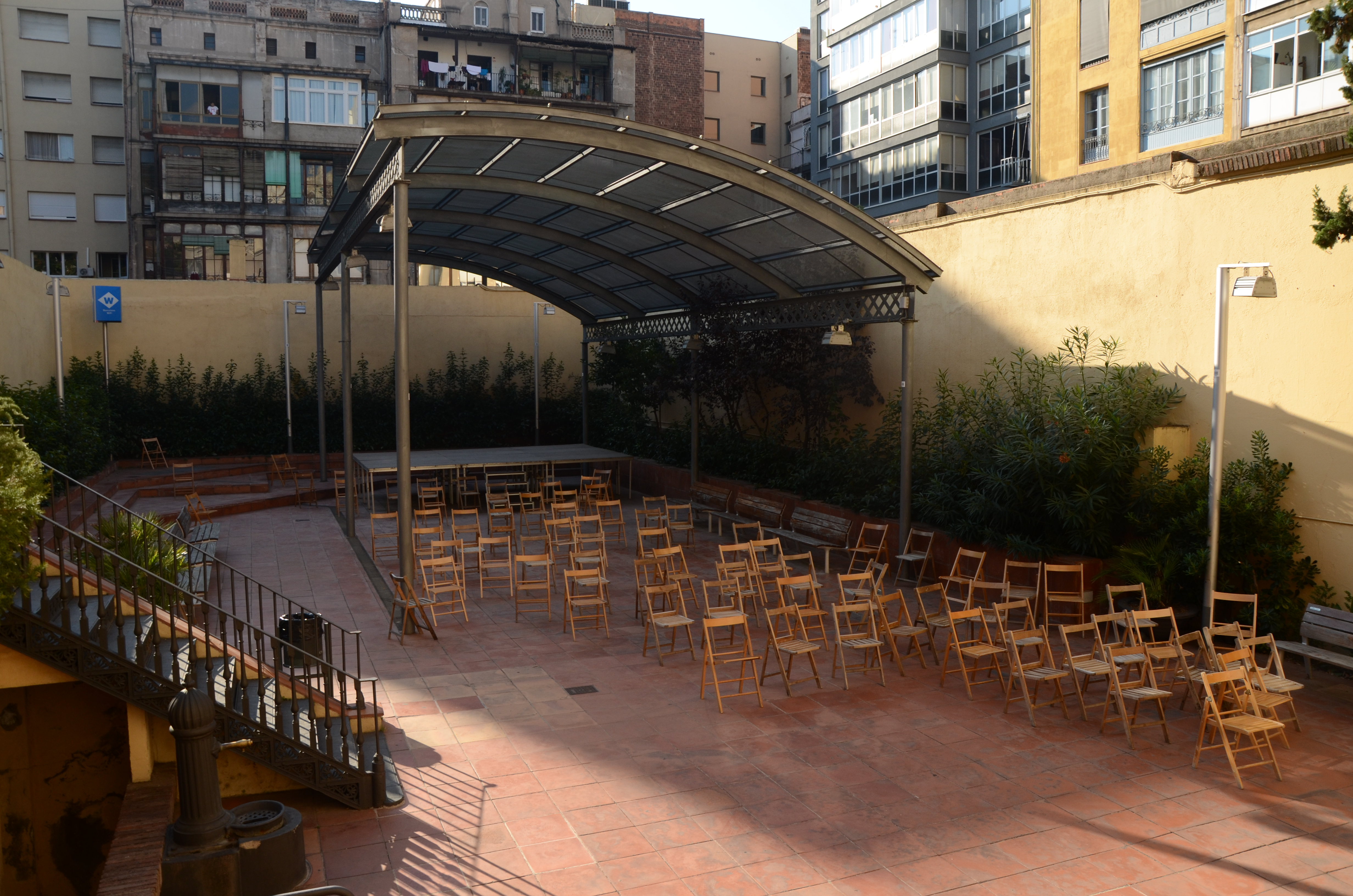 Casa Elizalde (Barcelona)